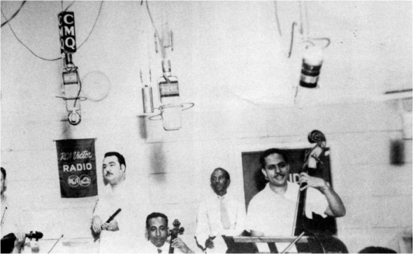 Arcaño y sus Maravillas at Radio CMQ, c. 1945: Arcaño on flute, Orestes López on cello, Cachao on bass.